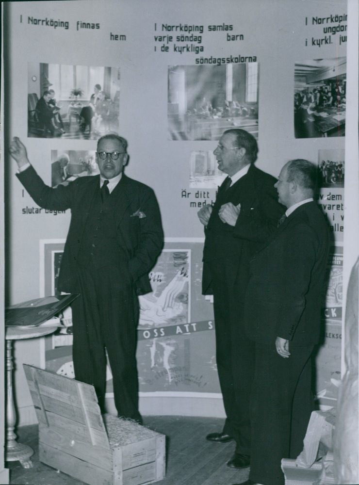 Arkitekt Martin Westerberg (1892-1963) på ungdomsutställningen "Vi vill" på Strömsholmen i Norrköping 1939 tillsammans med utställningens ordförande, kyrkoadjunkt E. Ramsten (i mitten) och pastor Henrik Karlsson.